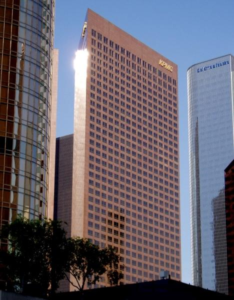 KPMG Tower